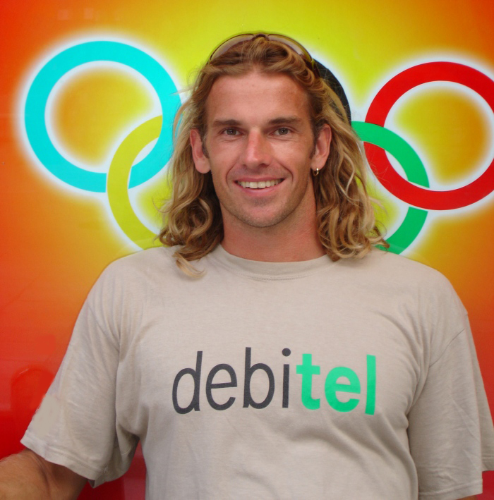 Slika Jurija Rovana.